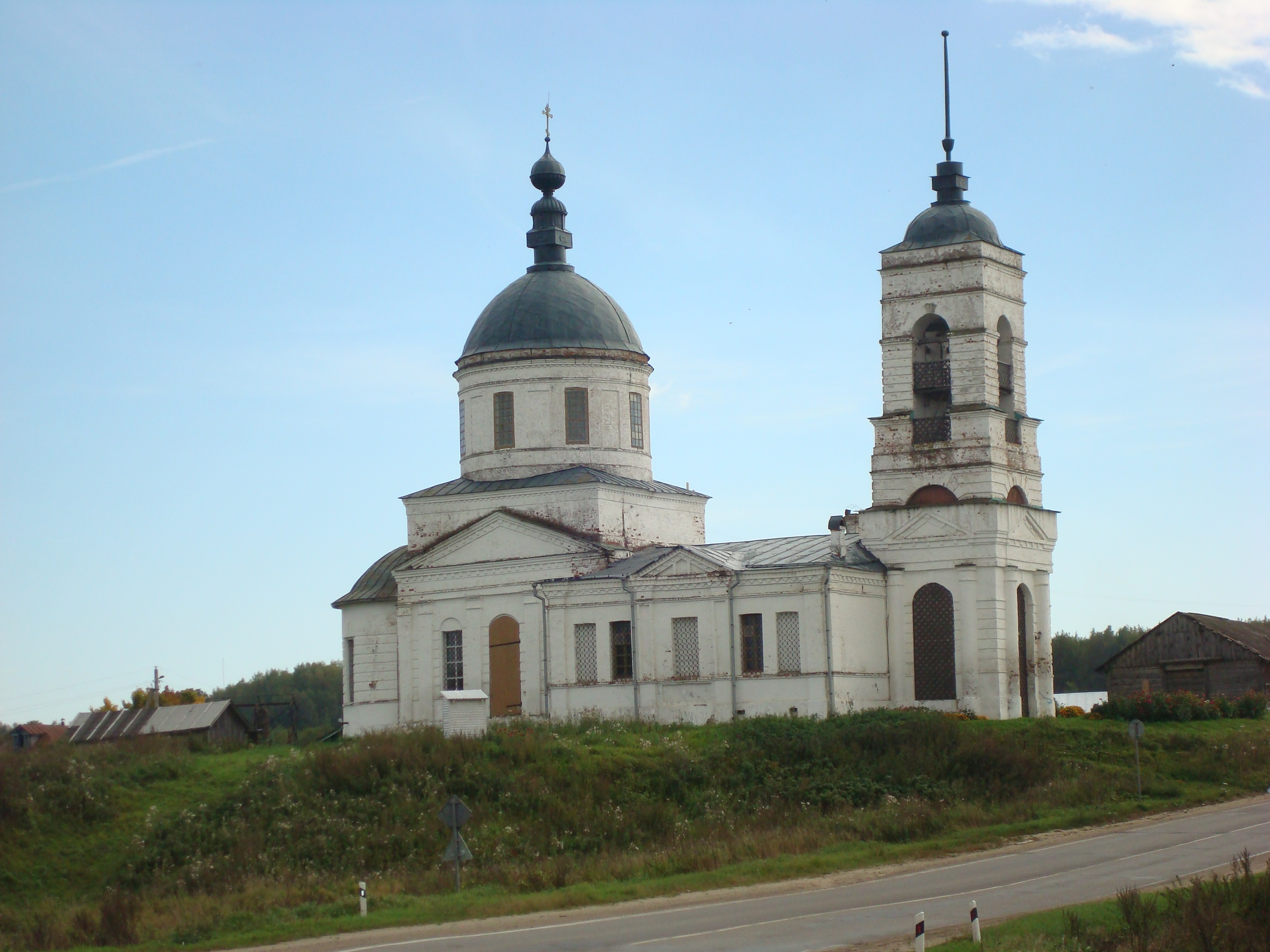 Церковь святителя Николая: Кутуково, Суздальский район, Владимирская область